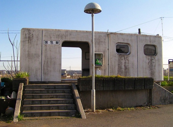 三木鉄道三木線の国包駅。2006年3月25日午後4時45分 (JST) ごろ投稿者が撮影。